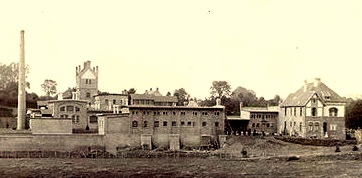 Ausschnitt einer alten Postkarte aus etwa 1900 mit dem Gebäudekomplexes des Alten Schlachthofes in Eupen in seinen Anfangsjahren